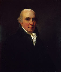 Dugald Stewart (17253-1828)